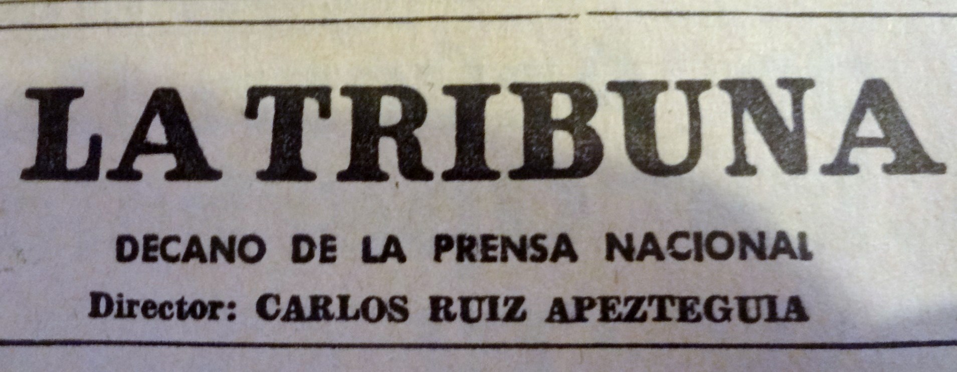 Logo La Tribuna